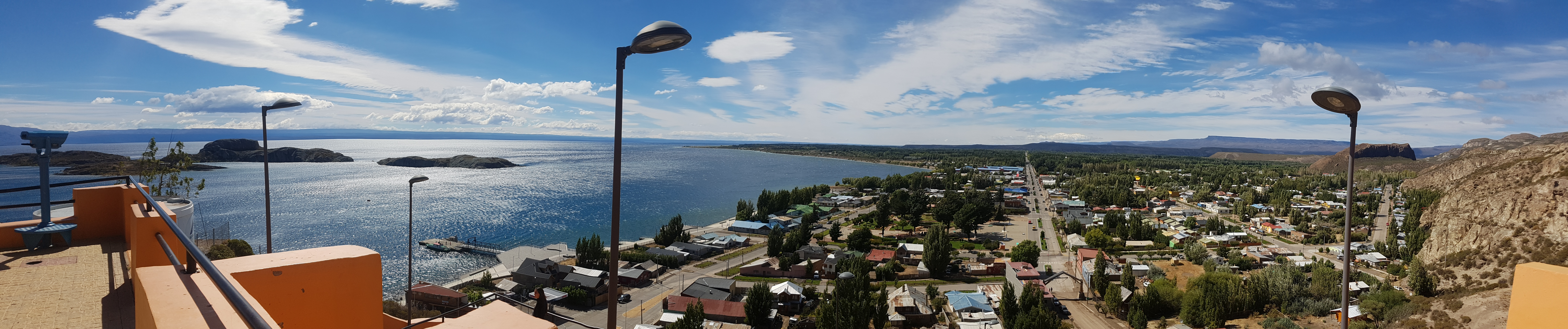 Panorámica de Chile Chico desde la Plaza del Viento en el Cerro Las Banderas